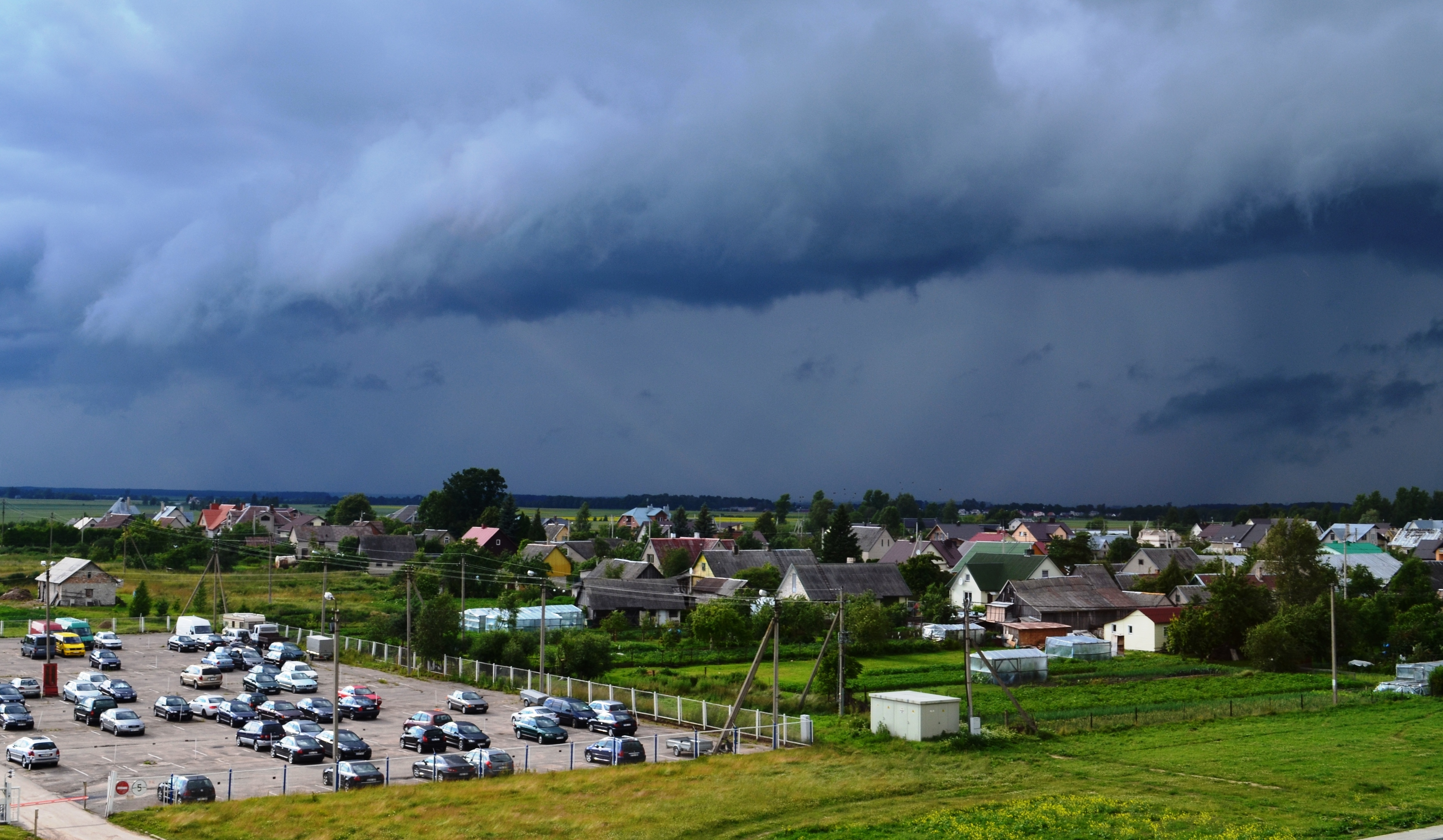 Kėdainių dalis Janušava